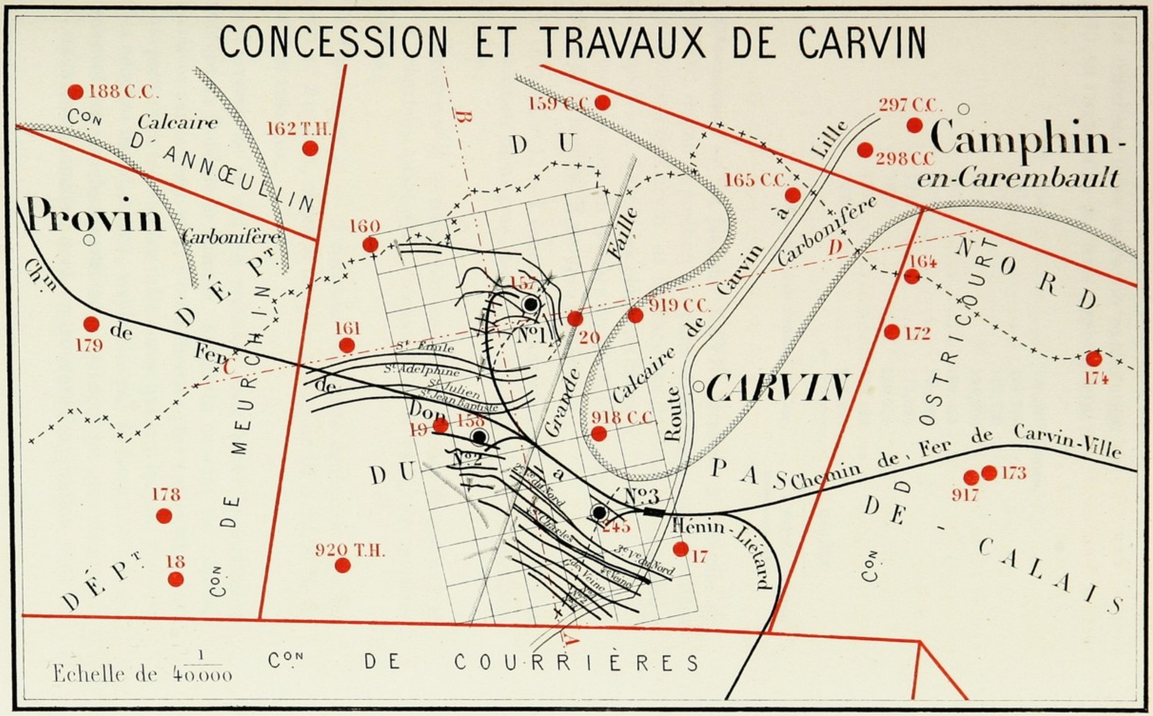 État des travaux de la Compagnie des mines de Carvin vers 1880.